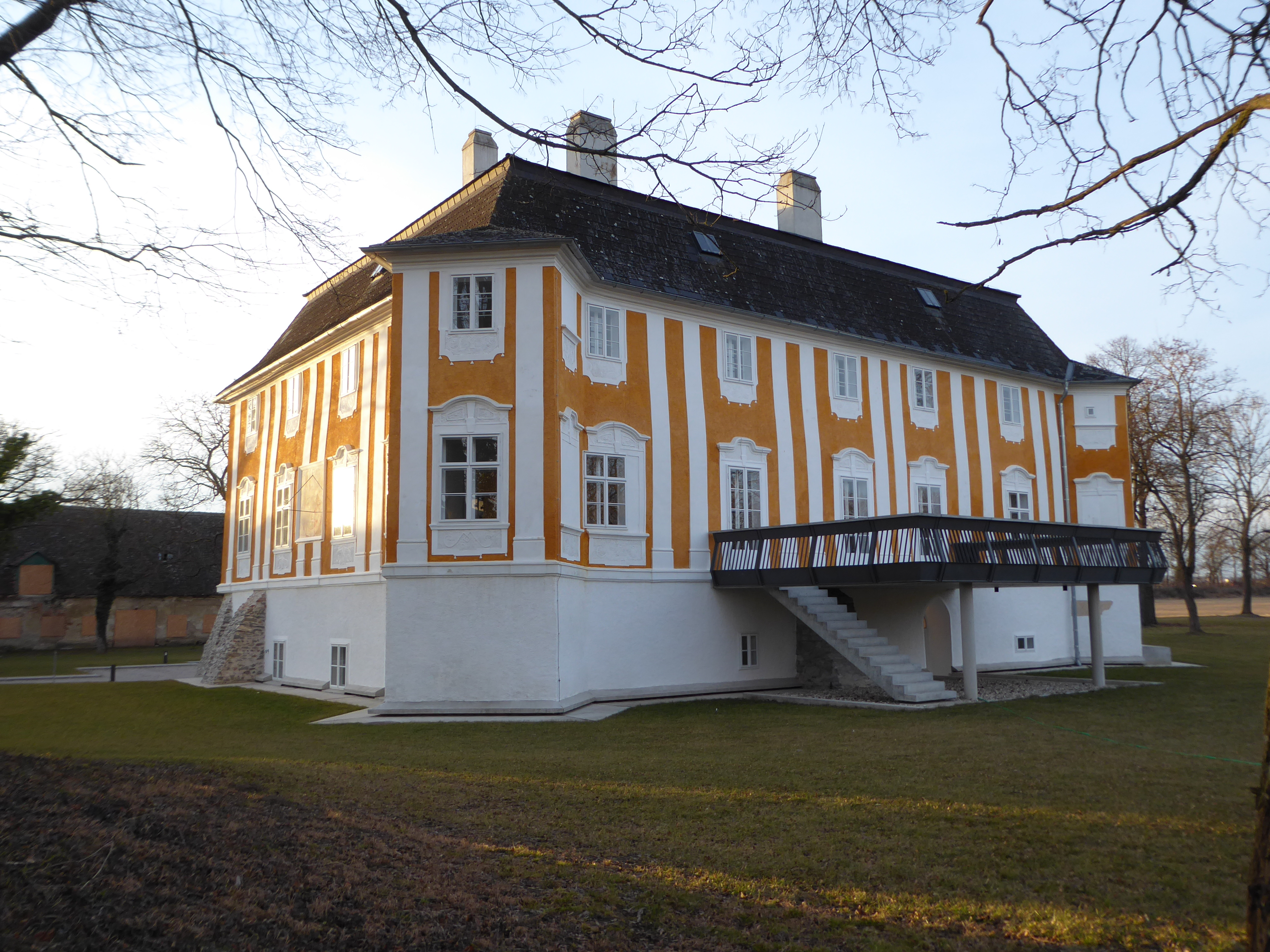 Schloss Wasserhof, Wasserhofstraße 5-9, Gneixendorf, Krems an der Donau, Niederösterreich